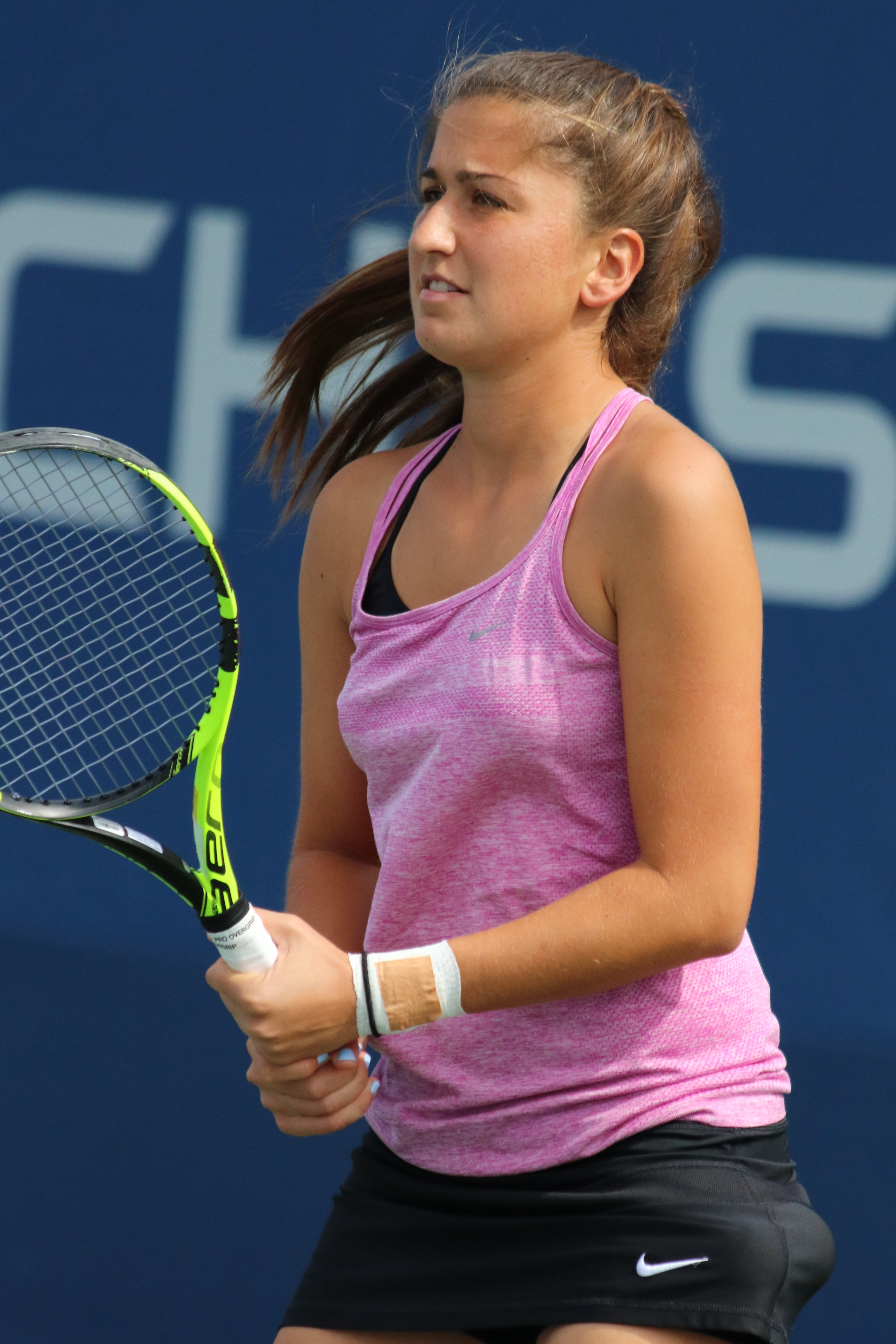 Bektas US16 (2)